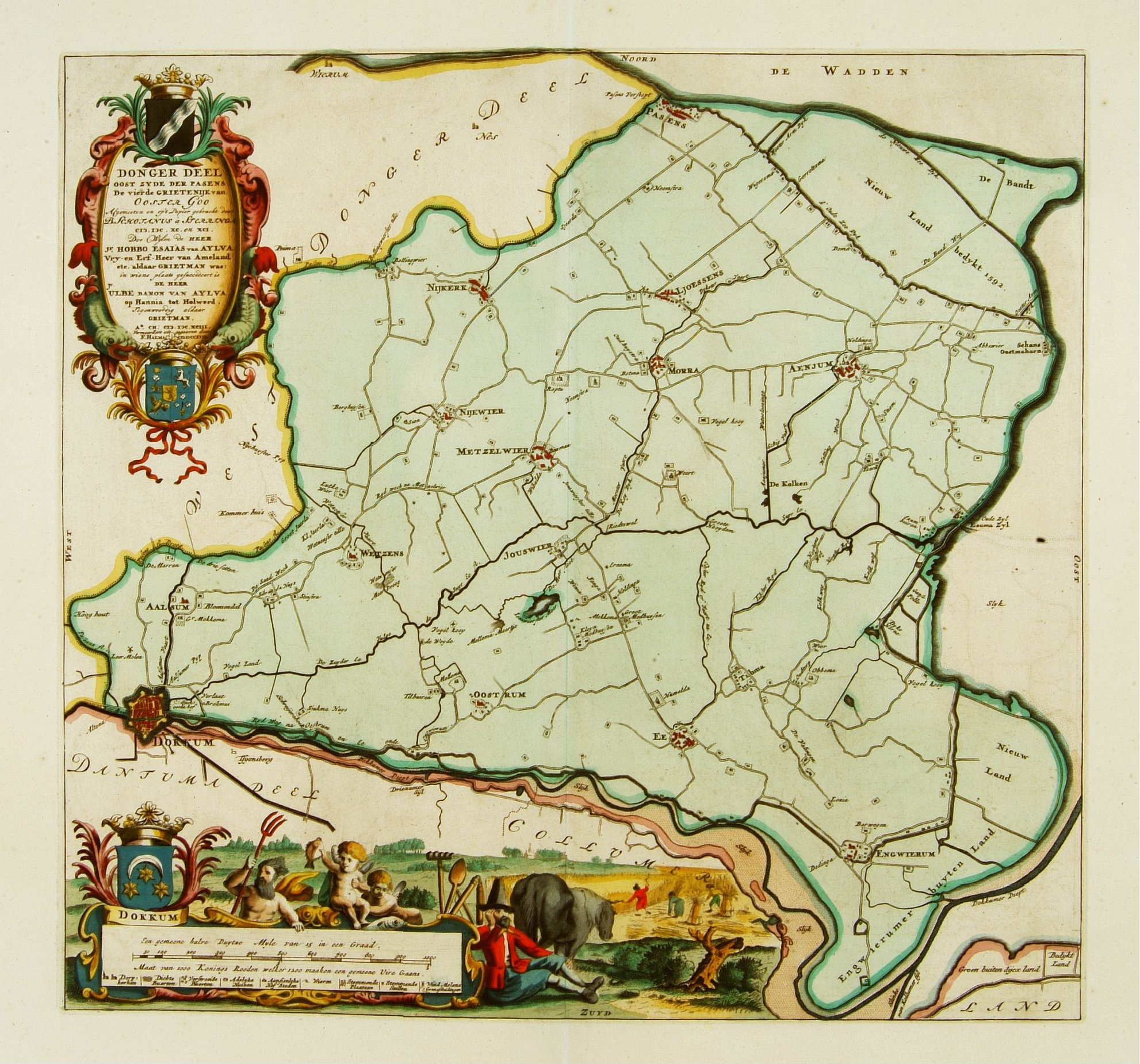 DONGER DEEL, OOST ZYDE DER PASENS, De Vierde GRIETENIJE van Ooster Goo...